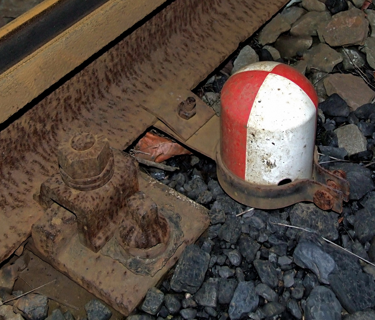 Grenzzeichen an Gleisanlage im düsseldorfer Hafen, nahe dem Kraftwerks Lausward